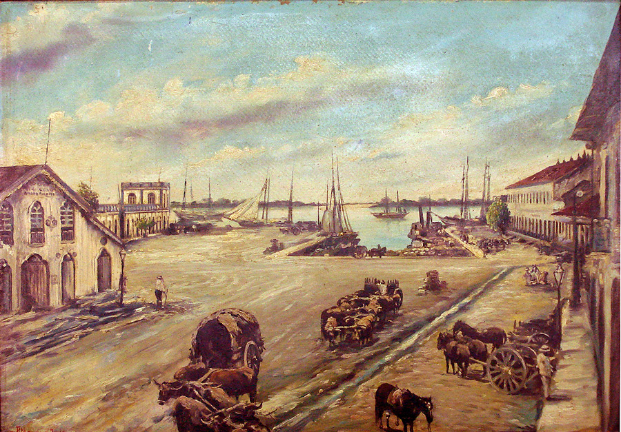 Athayde d'Avila: Doca das Flores (c.1880), hoje a área ocupada pela Praça Pereira Parobé, Porto Alegre, Brasil. Acervo do Museu Júlio de Castilhos